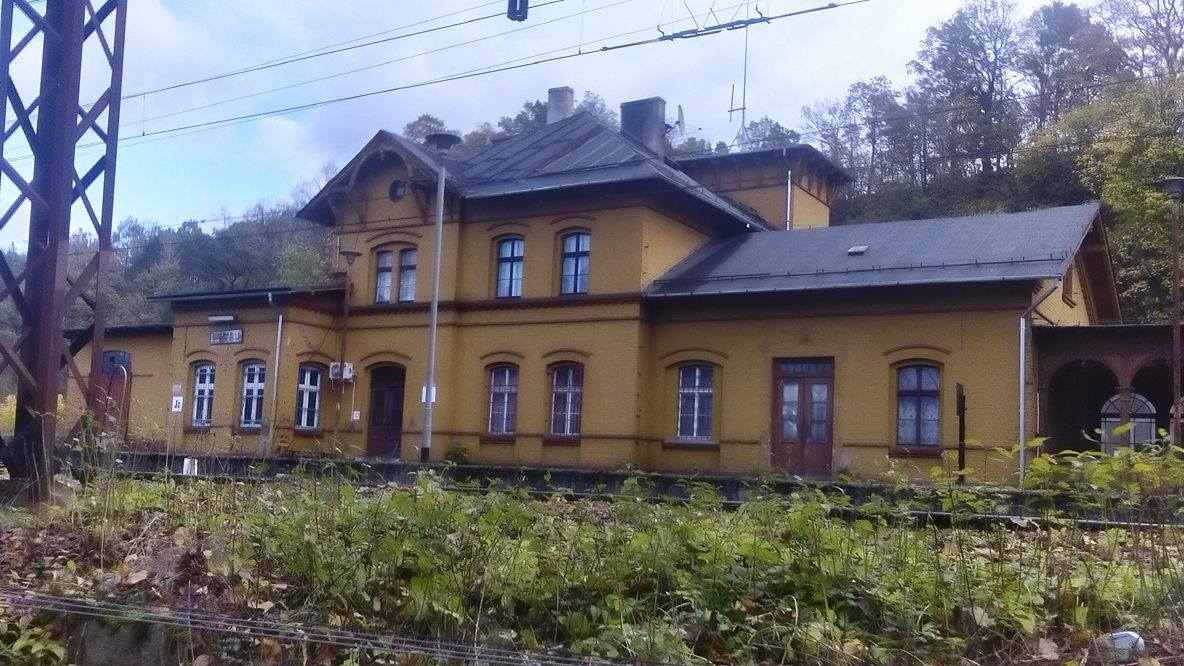 Dworzec kolejowy - widok od strony Kaczawy